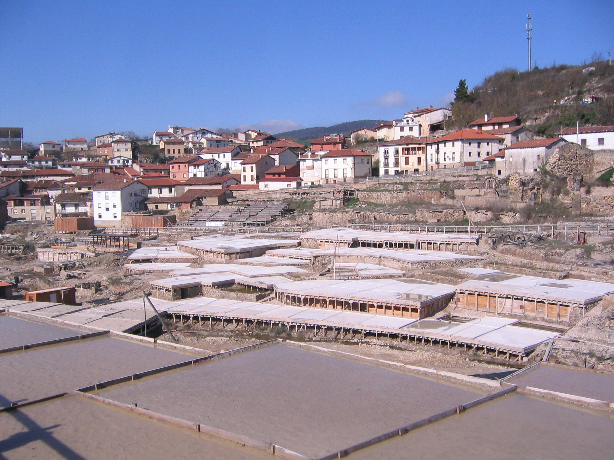 Salinas de Añana, Álava País Vasco (España)